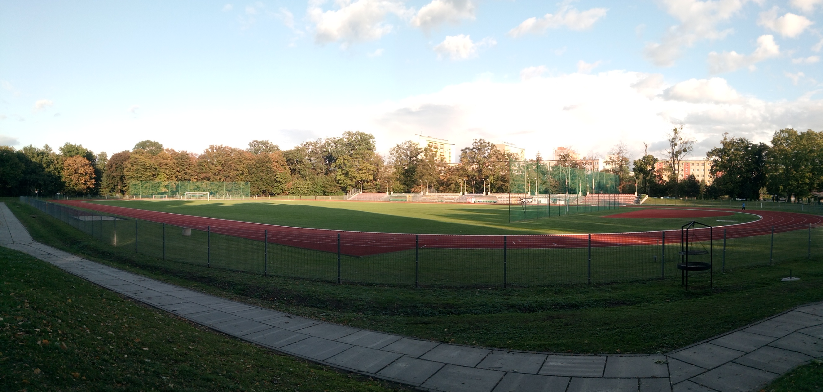 Стадыён